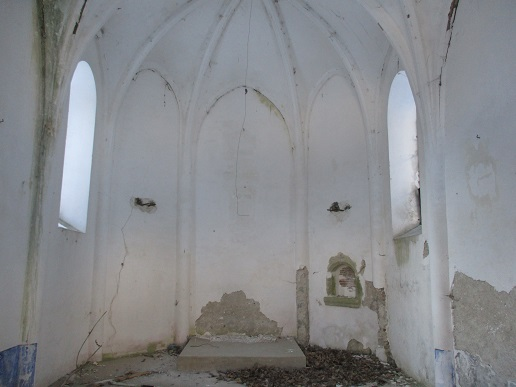 Intérieur de la Chapelle Saint-André de l'Abbaye.